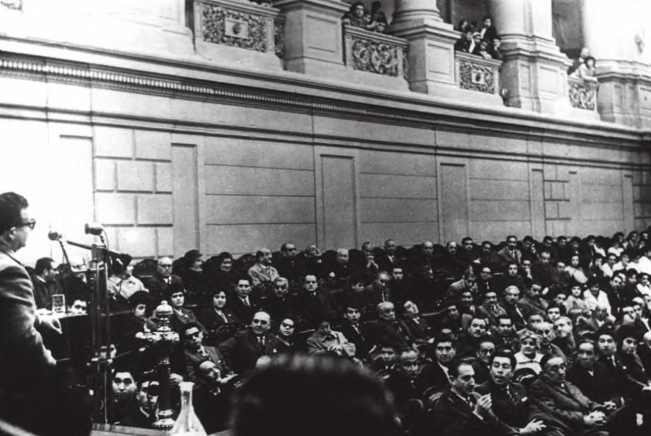 Salvador Allende en Congreso Pleno durante la campaña presidencial de 1964